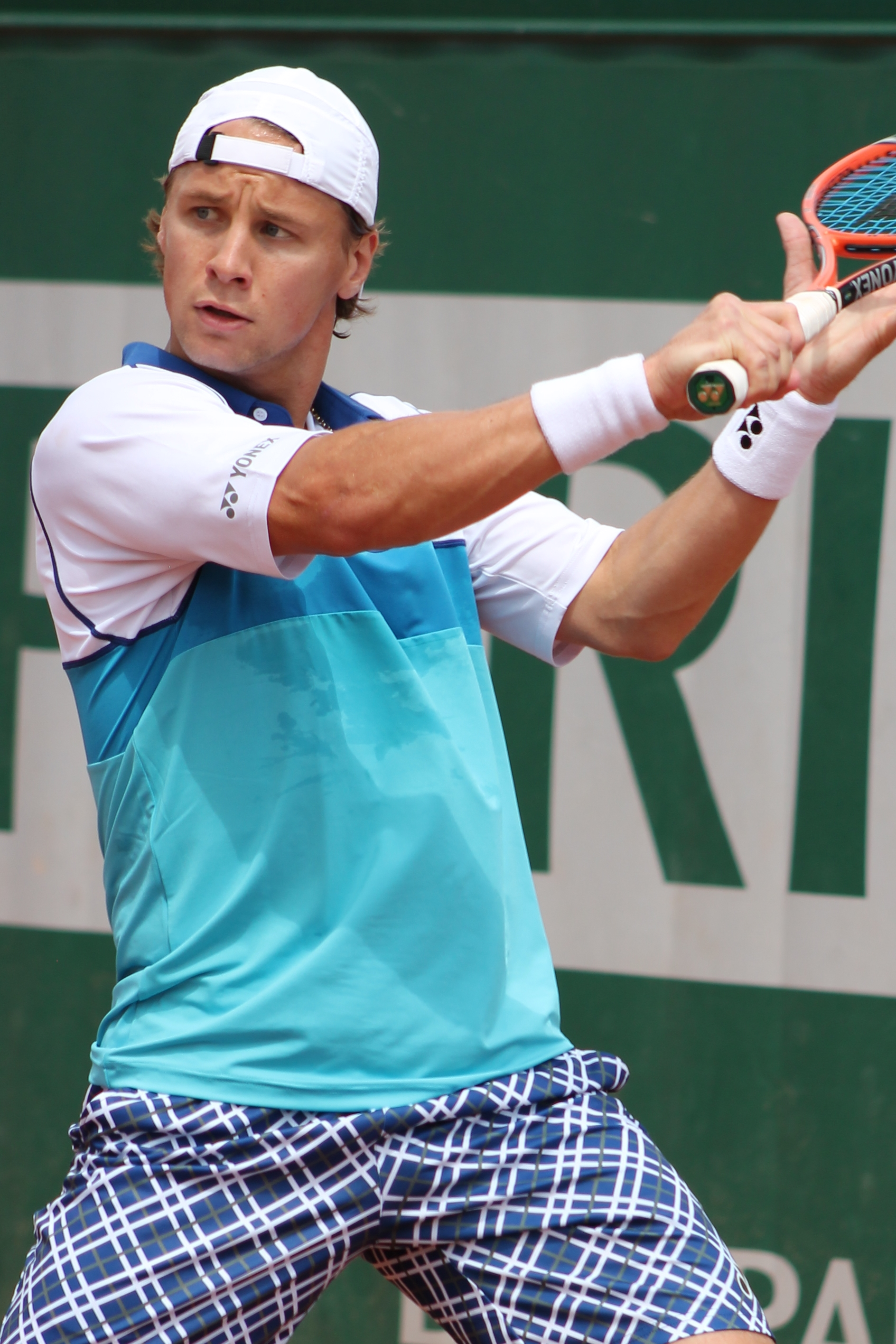 Berankis RG15 (5)